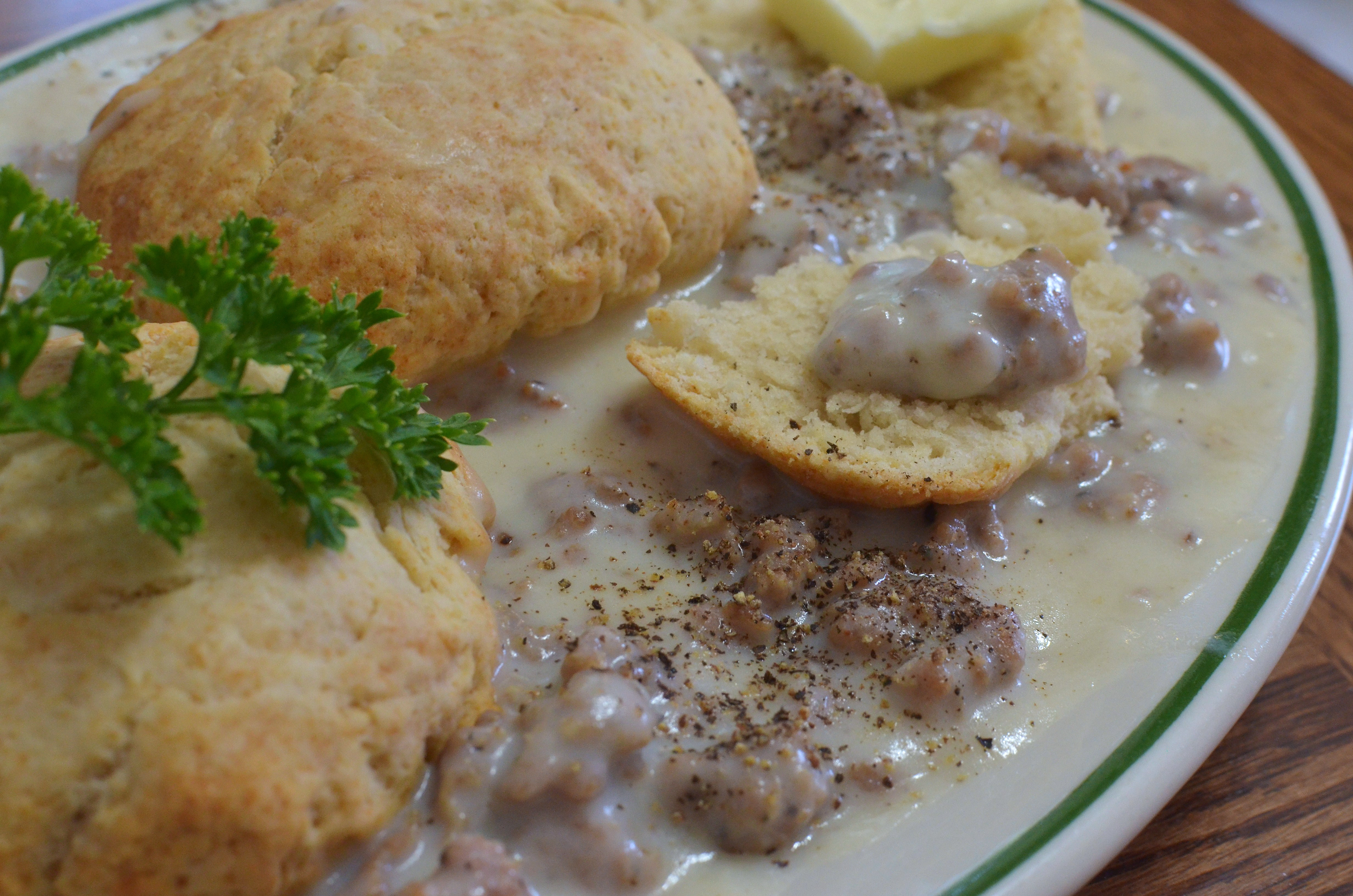 recipes